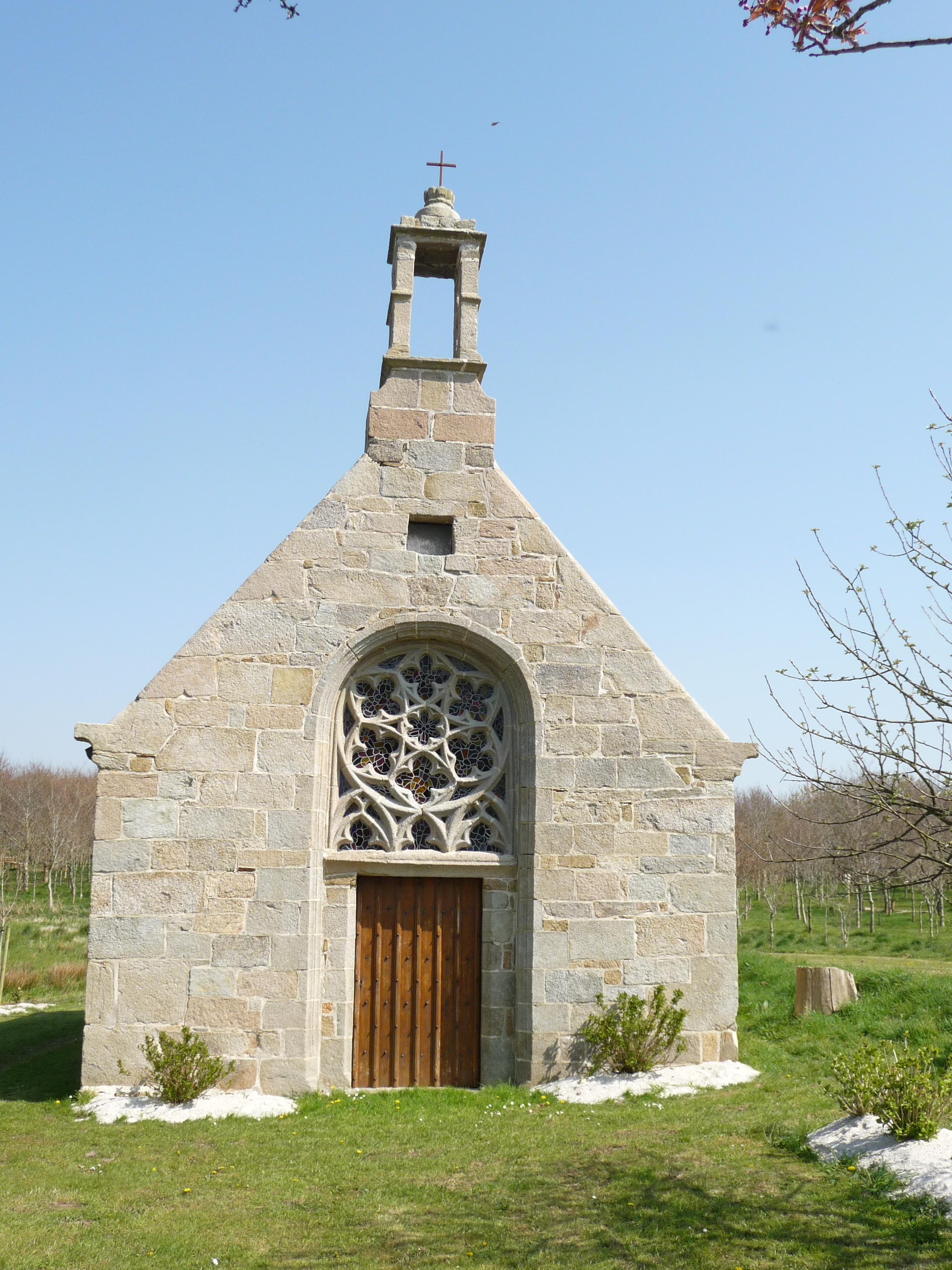 Chapelle de Troménec